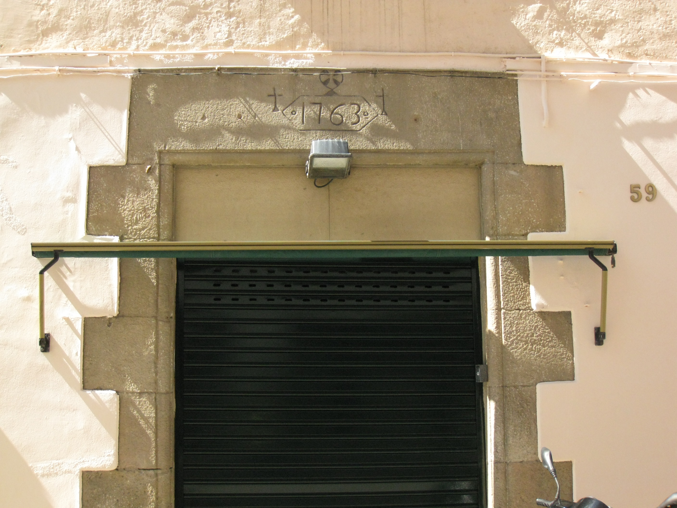 Llinda de l'habitatge al carrer Sant Josep, 59 (Calella)